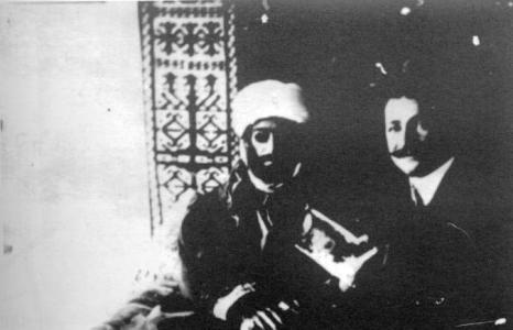 Шейх Абдель-Салям с представителем русского консульства в УрмииШейх Абдель-Салям и Петр Эллов (Ага Петрос), сотрудник русского вице-консульства в Урмии, на квартире полковника Андриевского